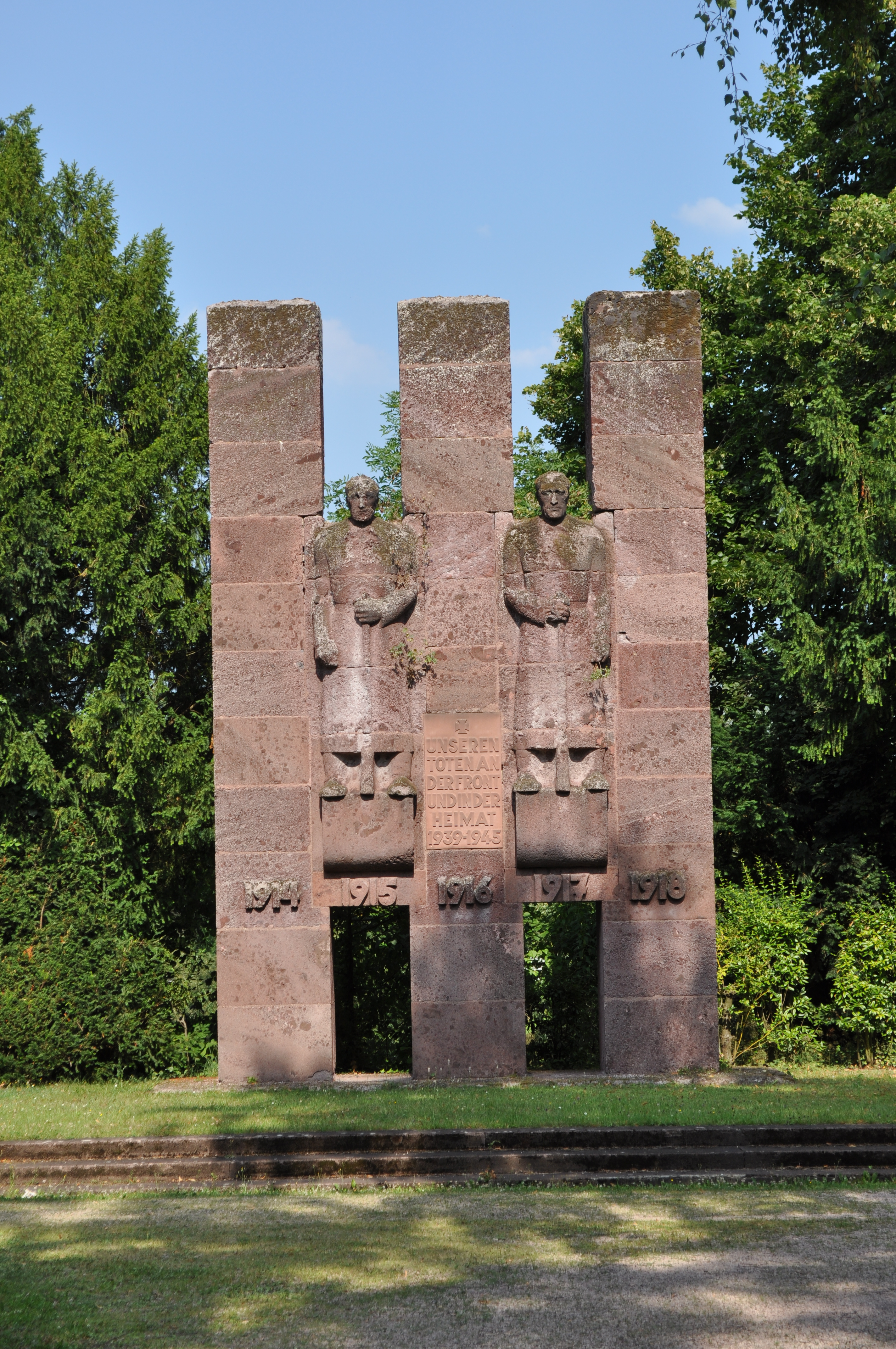 Fechenheim. Friedhof, Ehrenmal